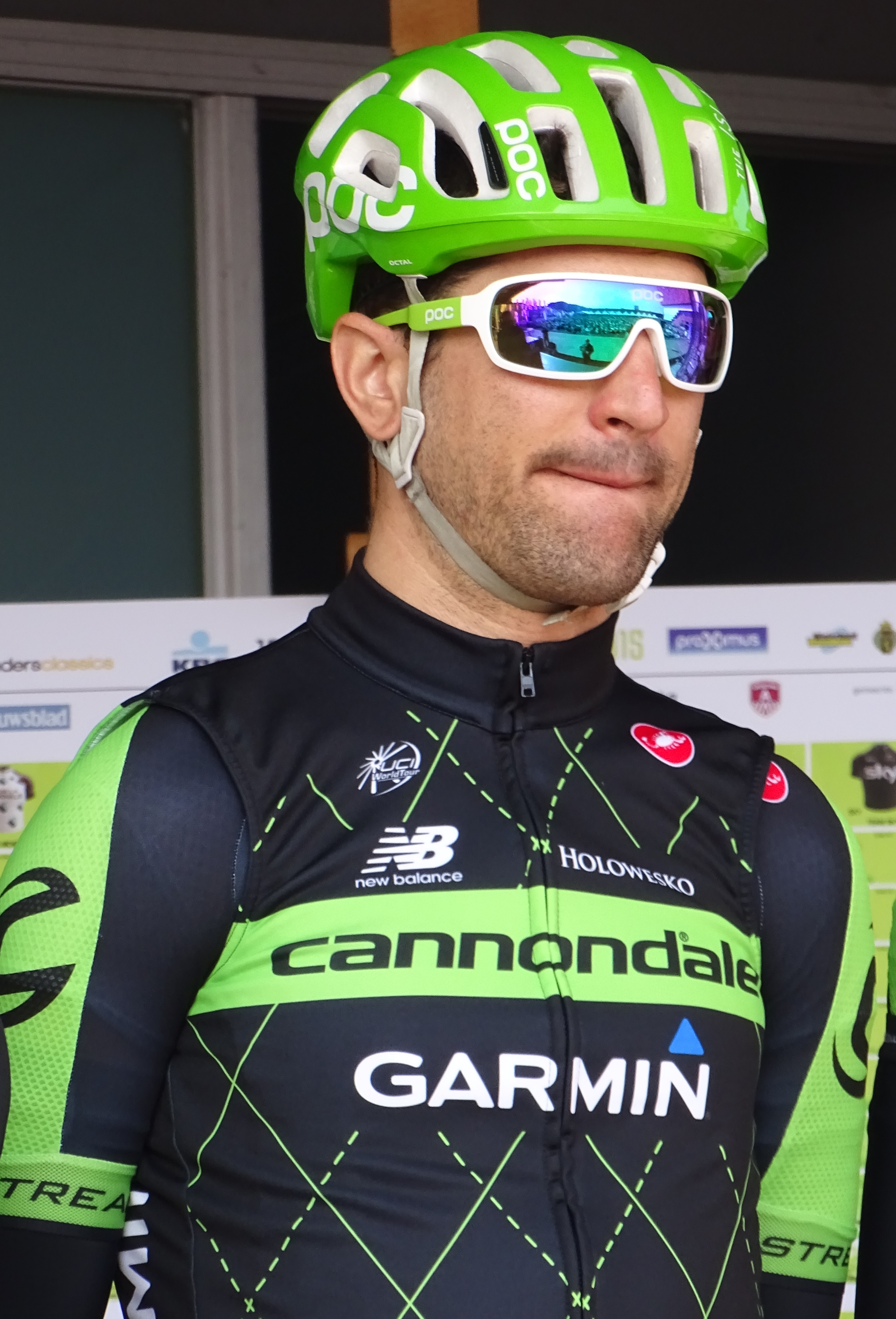 Reportage réalisé le mercredi 8 avril à l'occasion du départ du Grand Prix de l'Escaut 2015 à Anvers, Belgique.